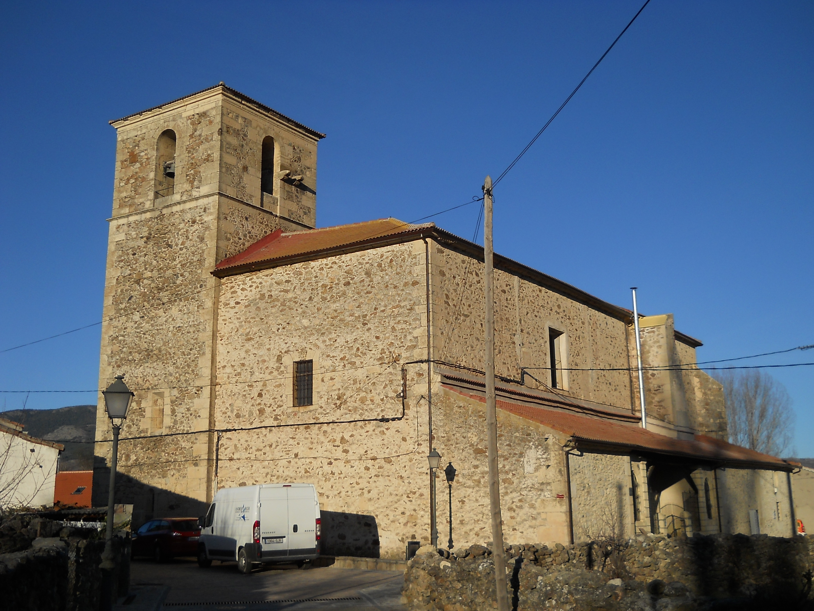 Vista desde el sur, iglesia de San Miguel, Pinilla del Valle, Madrid, España